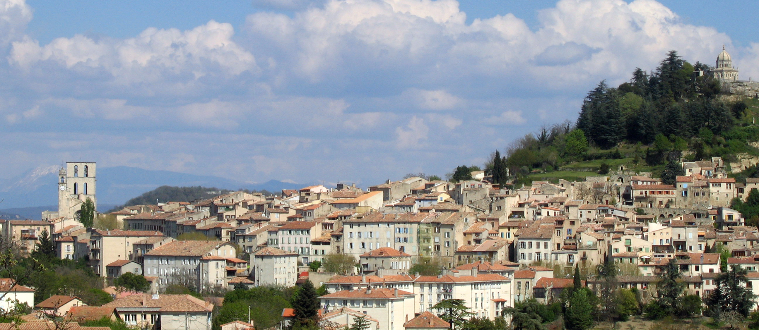 Photo prise le 21 avril 2006 à Forcalquier par Charles Roman et Sami Bizet